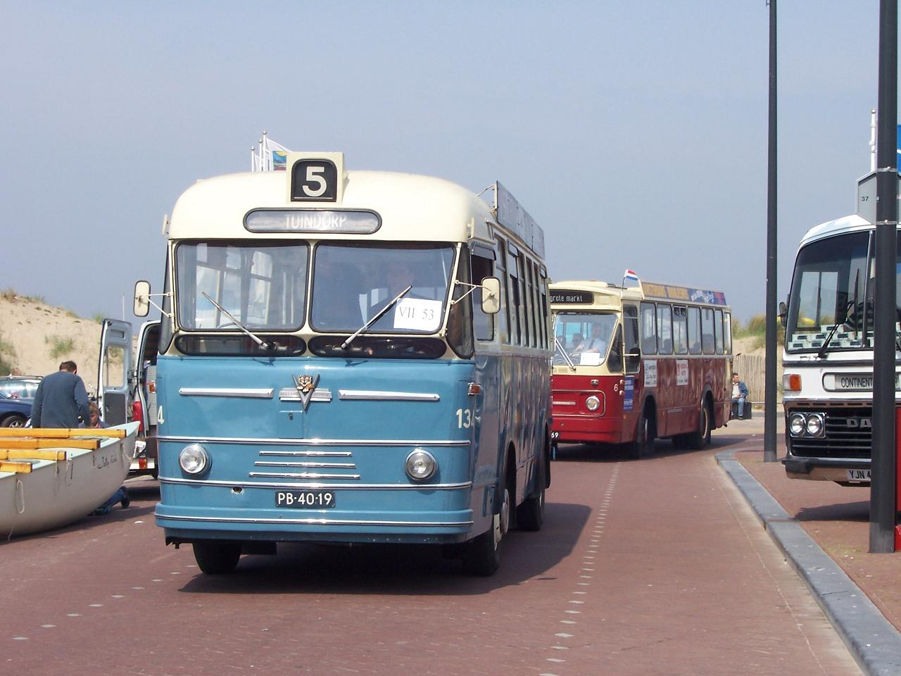 Museumbus van de Stichting Veteraan Autobussen.